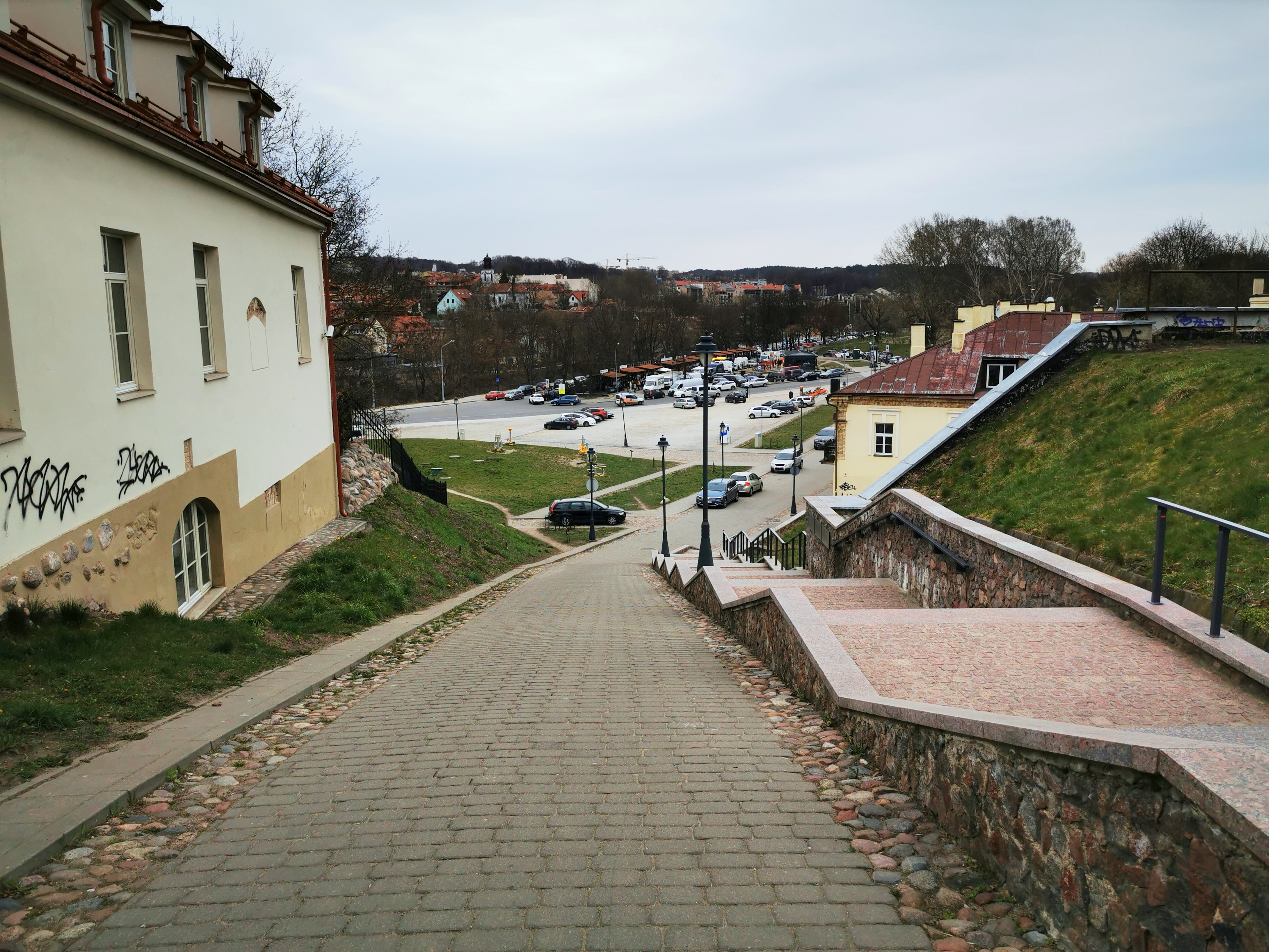 Onos Šimaitės gatvė